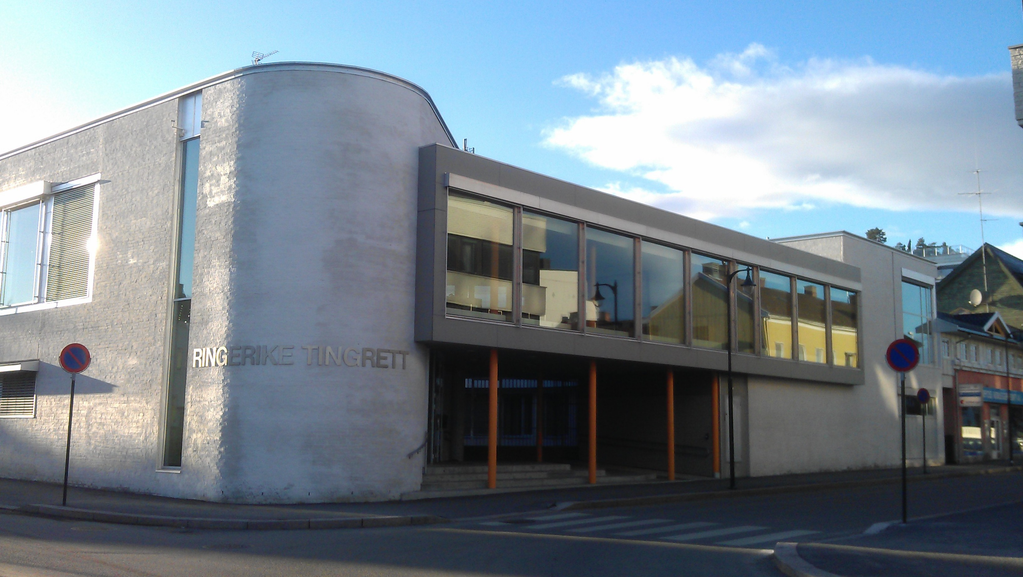 Ringerike tingrett i Hønefoss.